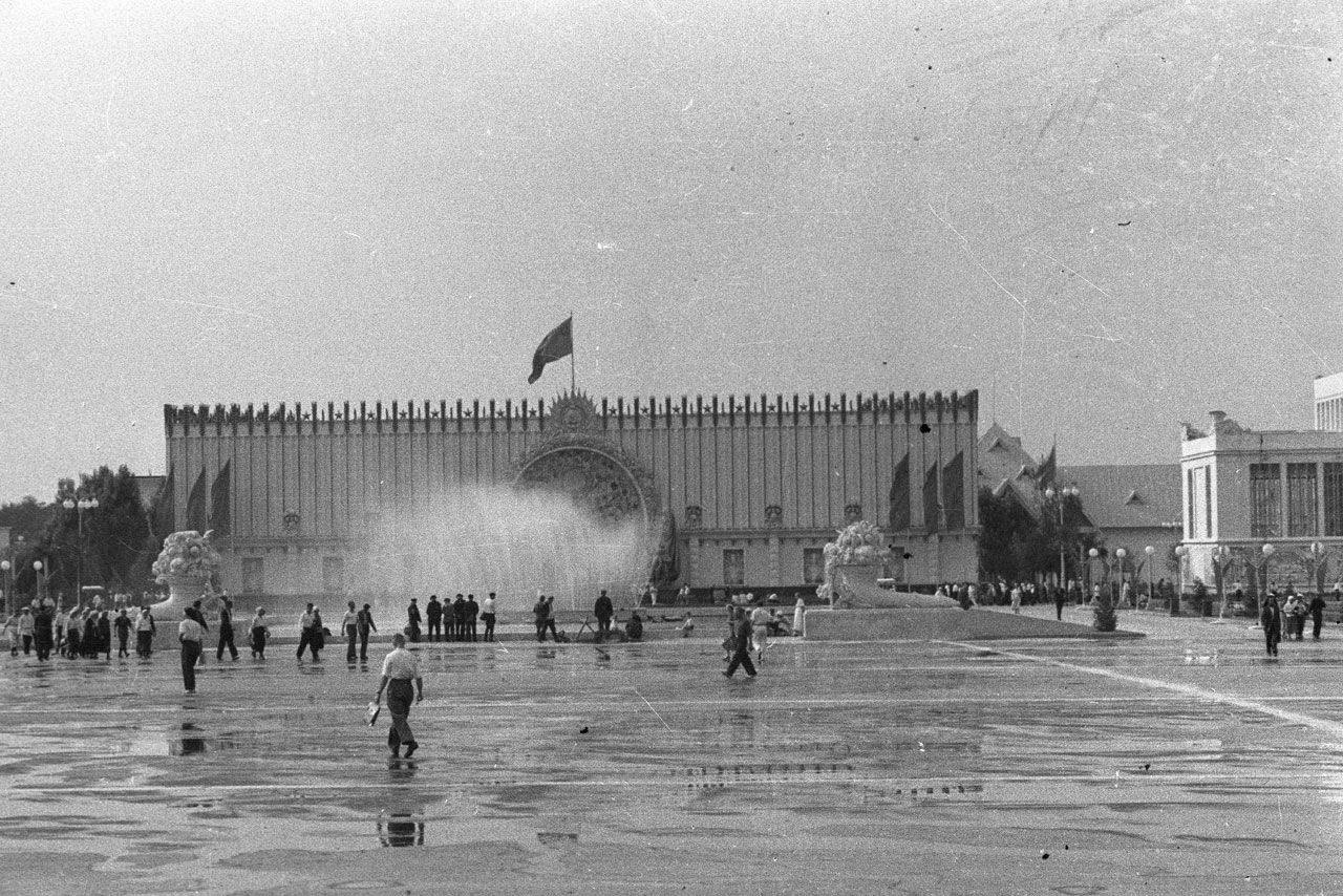 Главный фонтан Всесоюзной сельскохозяйственной выставки. 1939 г. Вид со стороны Главного павильона